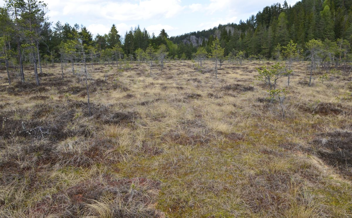 Veggermyra er en svakt hvelvet nedbørsmyr.